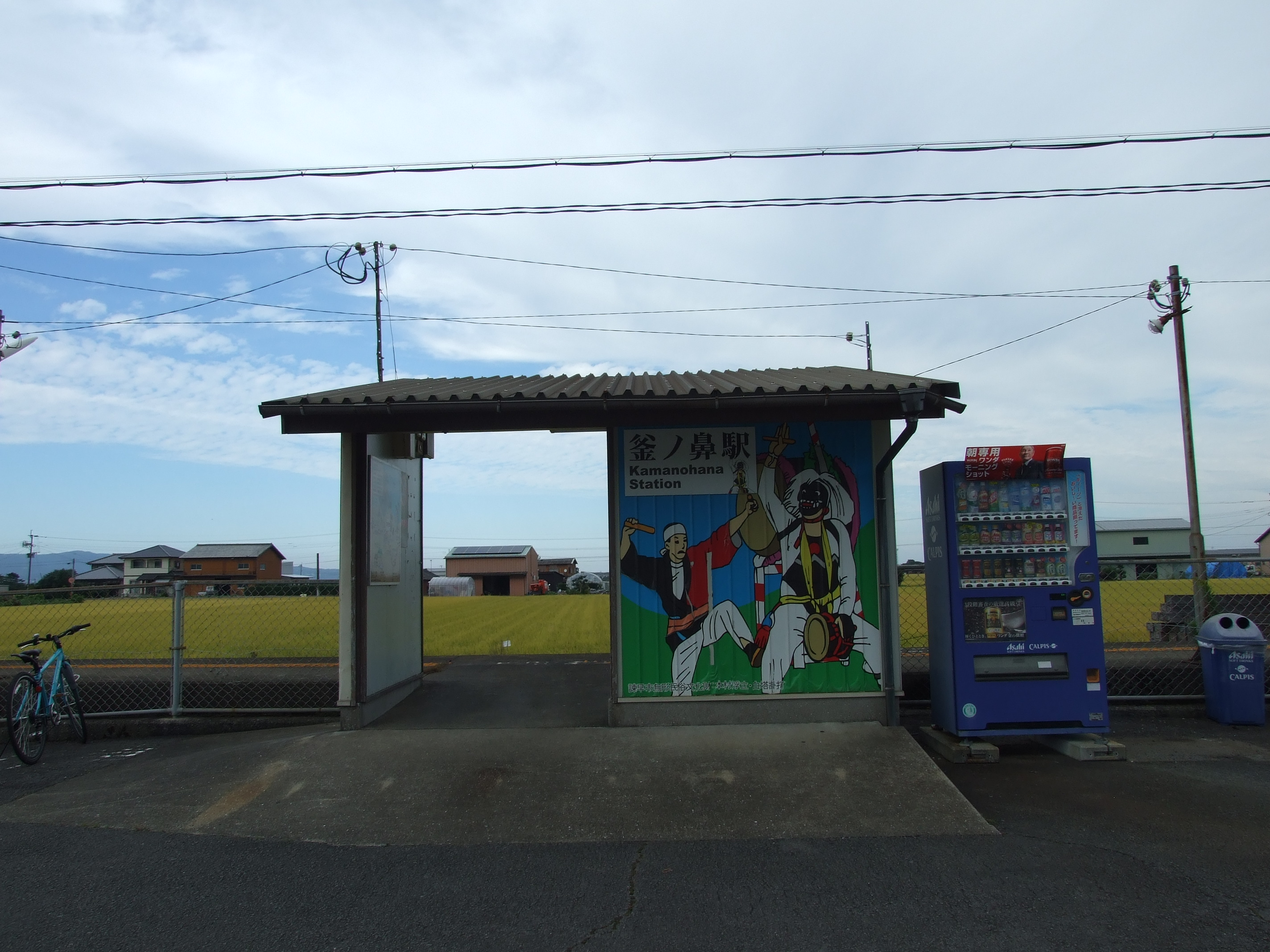 2016年10月14日撮影